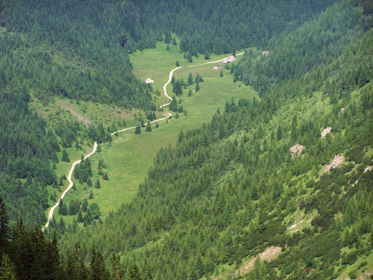 Polana Jaworzynka(Tatra Mountains)